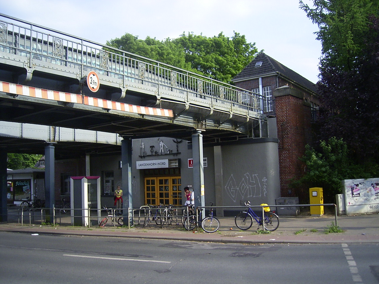 Die Hochbahnhaltestelle Langenhorn-Nord erschließt vor allem die Fritz-Schumacher-Siedlung, die Siedlung Diekmoorweg und die Siedlung Wulffsgrund.